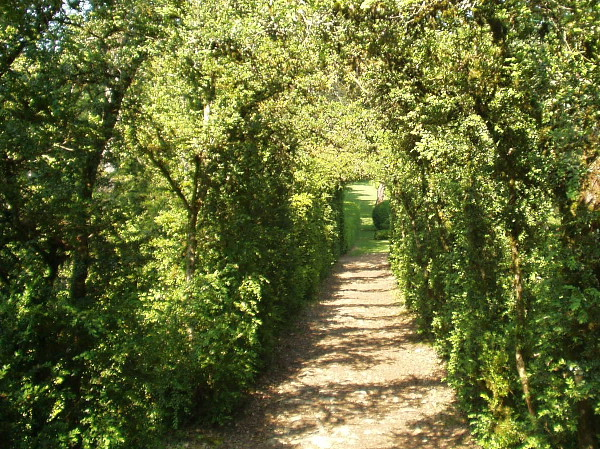 een berceau in Frankrijk. eigen foto